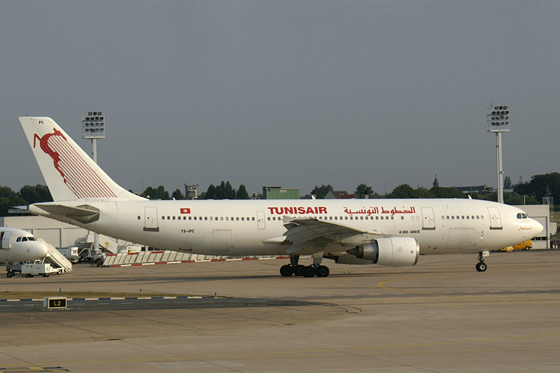 Tunisair Airbus A300-605R TS-IPC